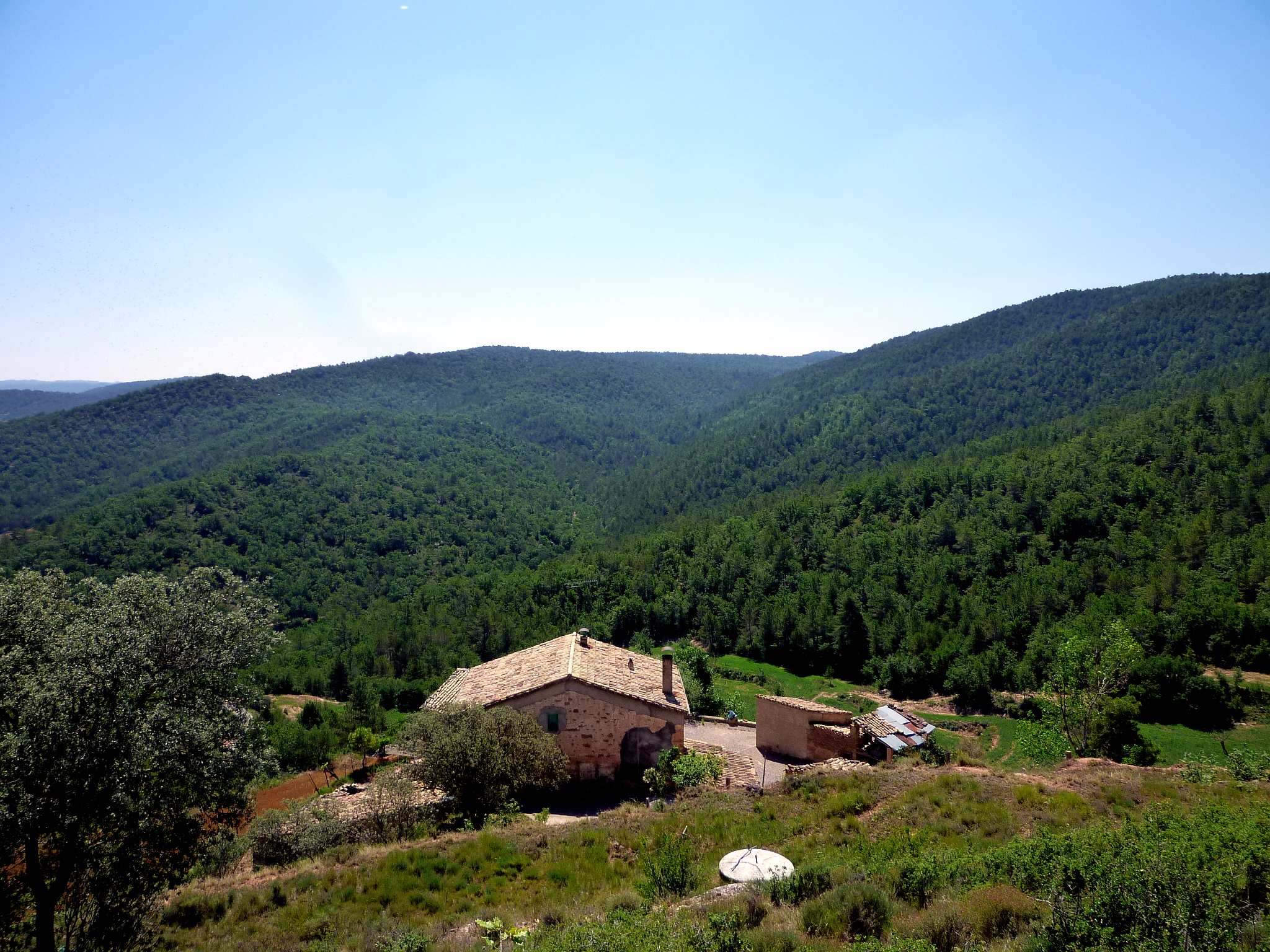 Masia de cal Llobet i el Clot de l'Infern al fons, a les obagues de la riera de Madrona (Pinell - Solsonès) This is a a photo of a natural area in Catalonia, Spain, with id: ES5130027